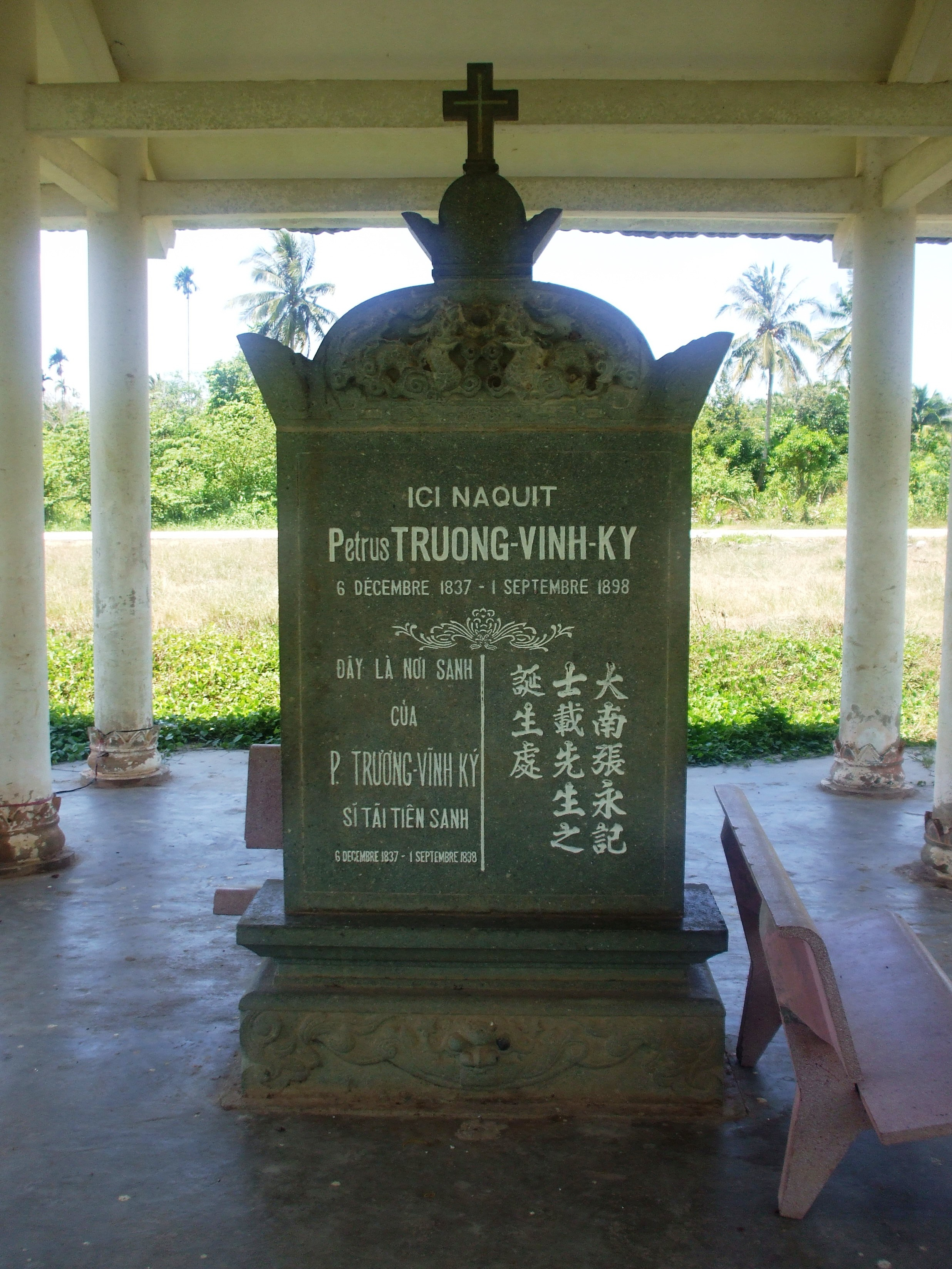 Bia kỷ niệm nơi sinh của nhà bác học Trương Vĩnh Ký tại Cái Mơn (Chợ Lách, Bến Tre, Việt Nam).